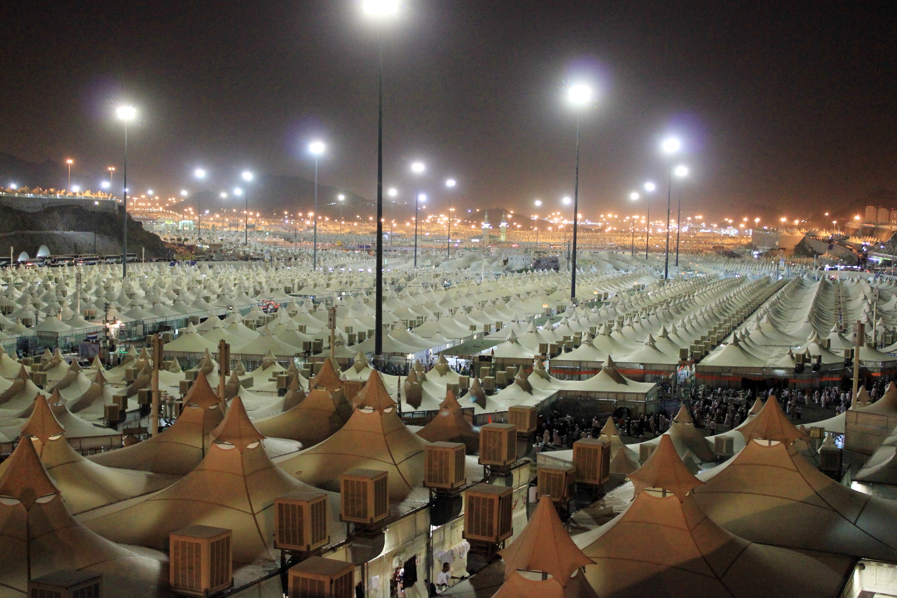 Tenda-tenda di Mina